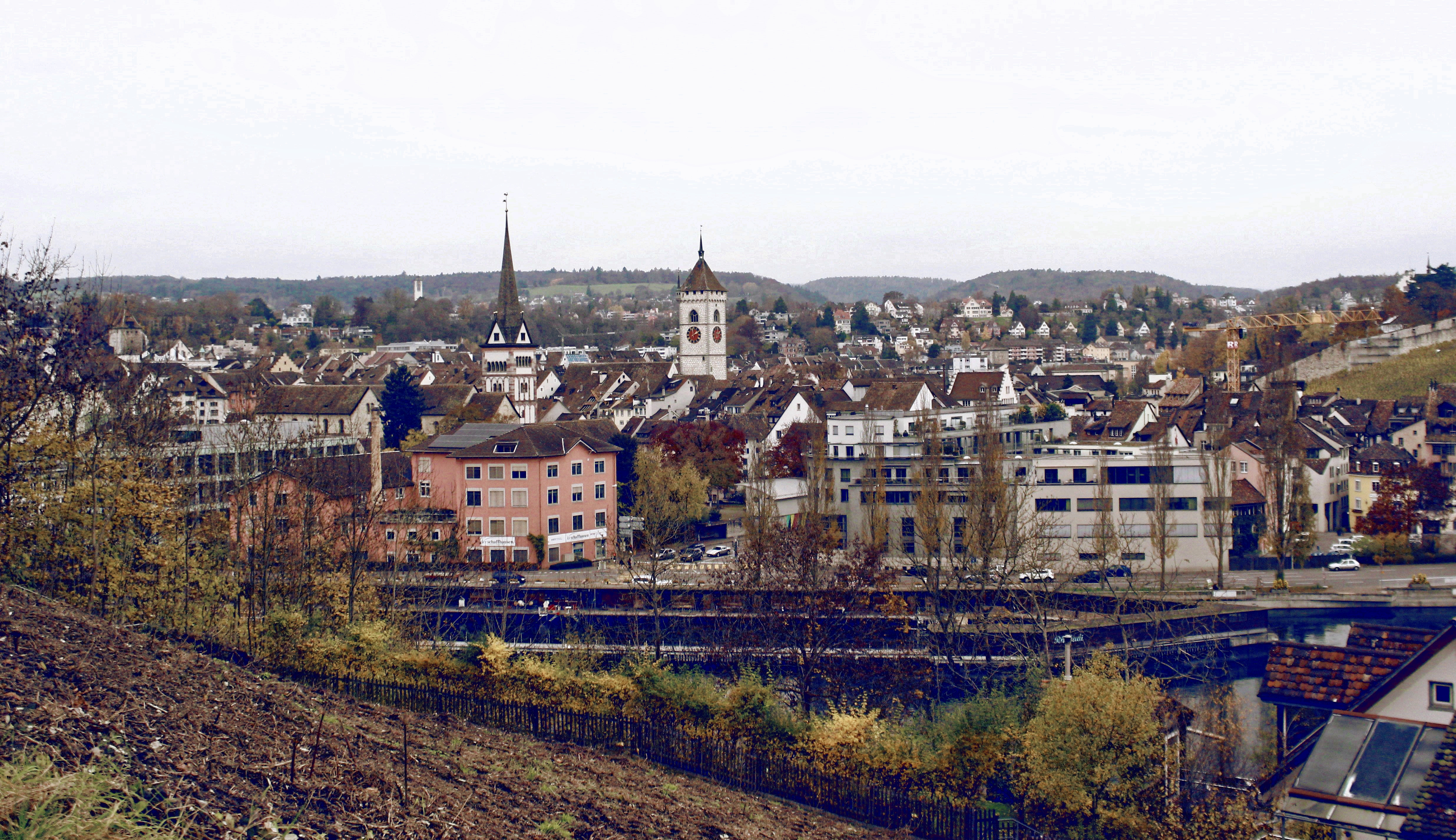 Altstadt Schaffhausen